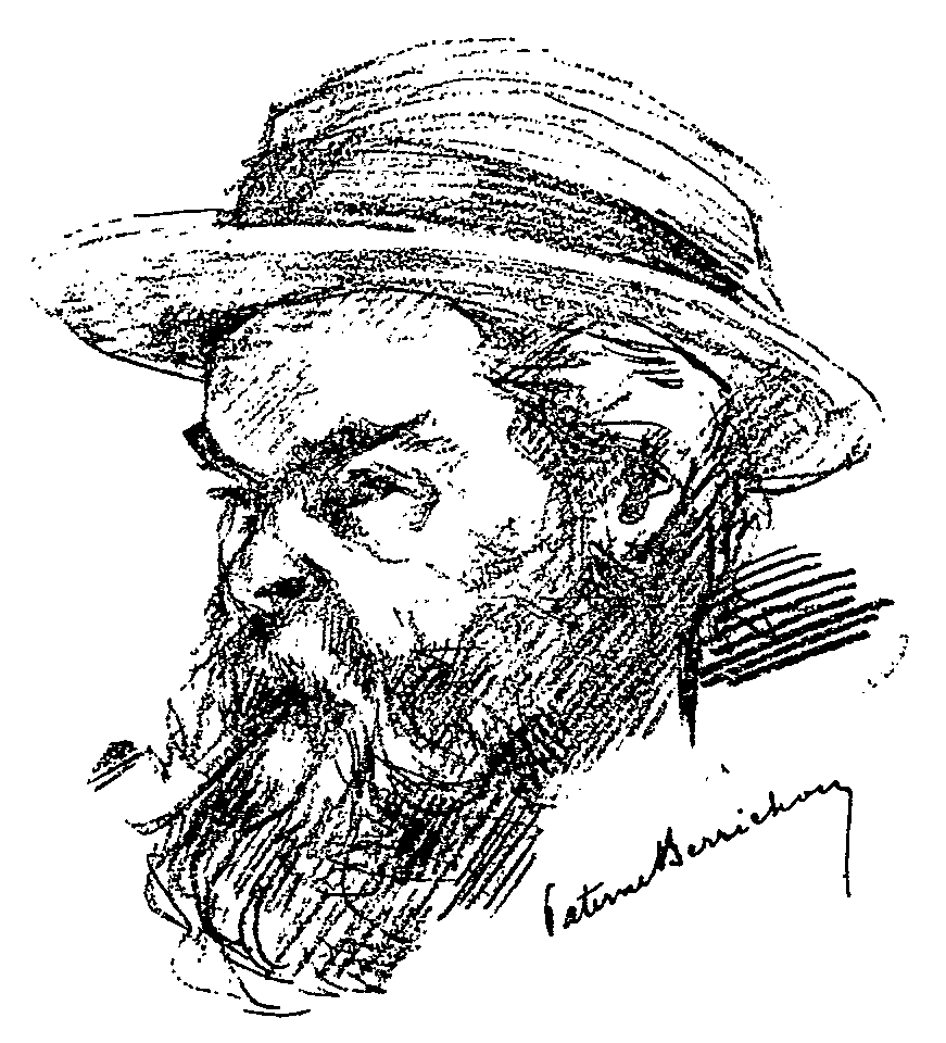 Paul Verlaine (1844-1896) by Paterne Berrichon (1855-1922).